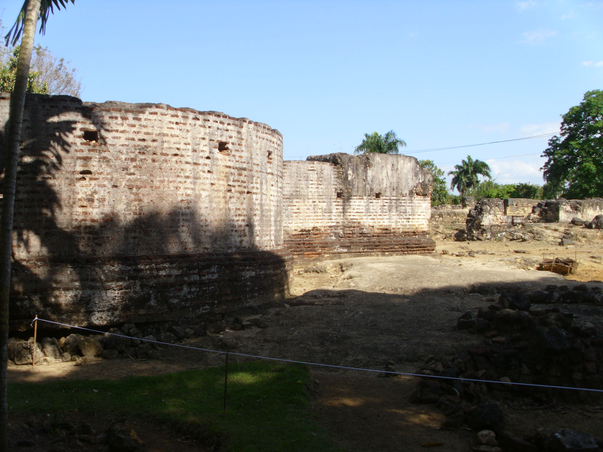 Ruïnes van de stadswal en gebouwen van het oude Concepcion La Vega